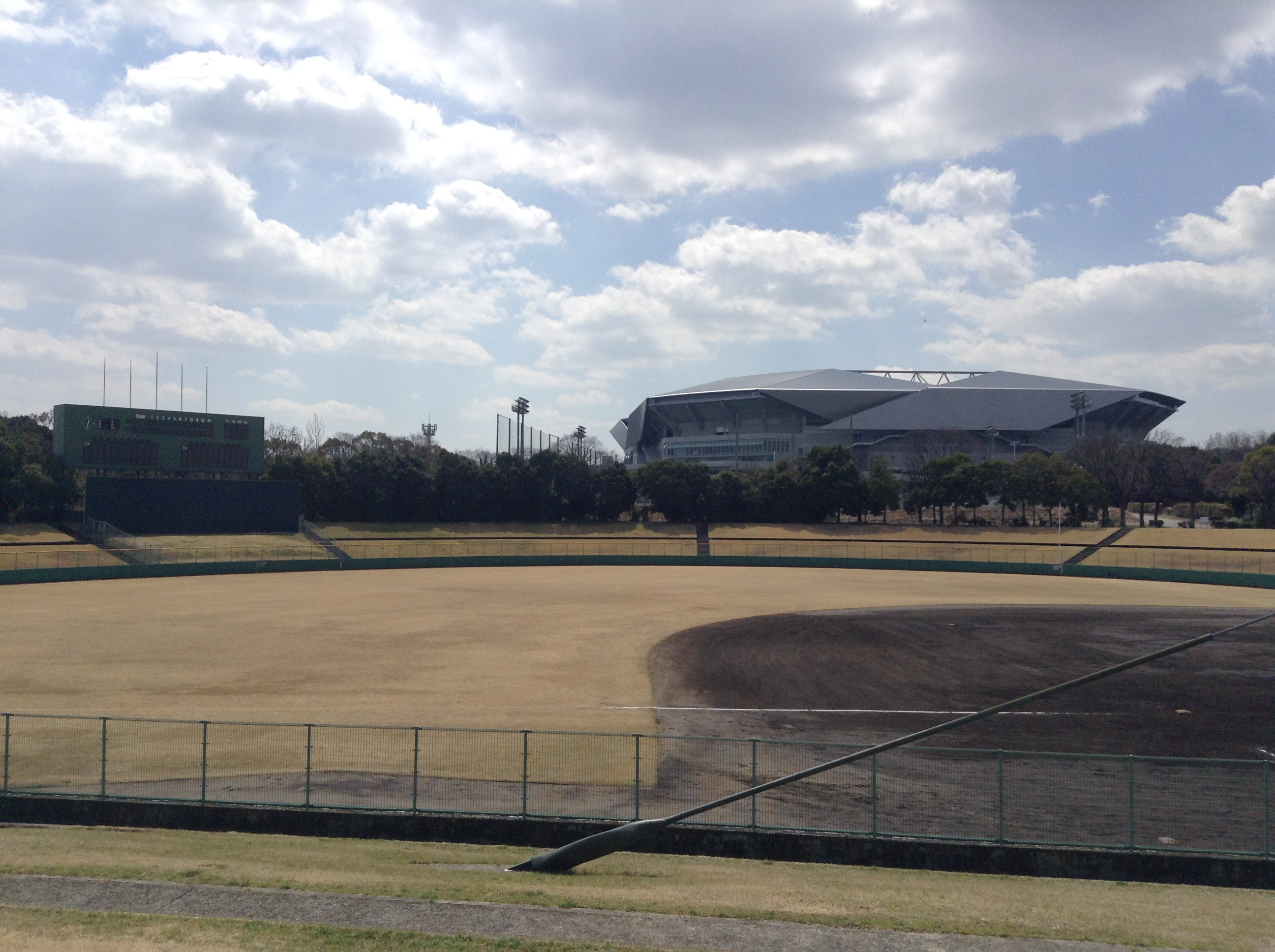 Suita City Football Stadium and Expo '70 Baseball field